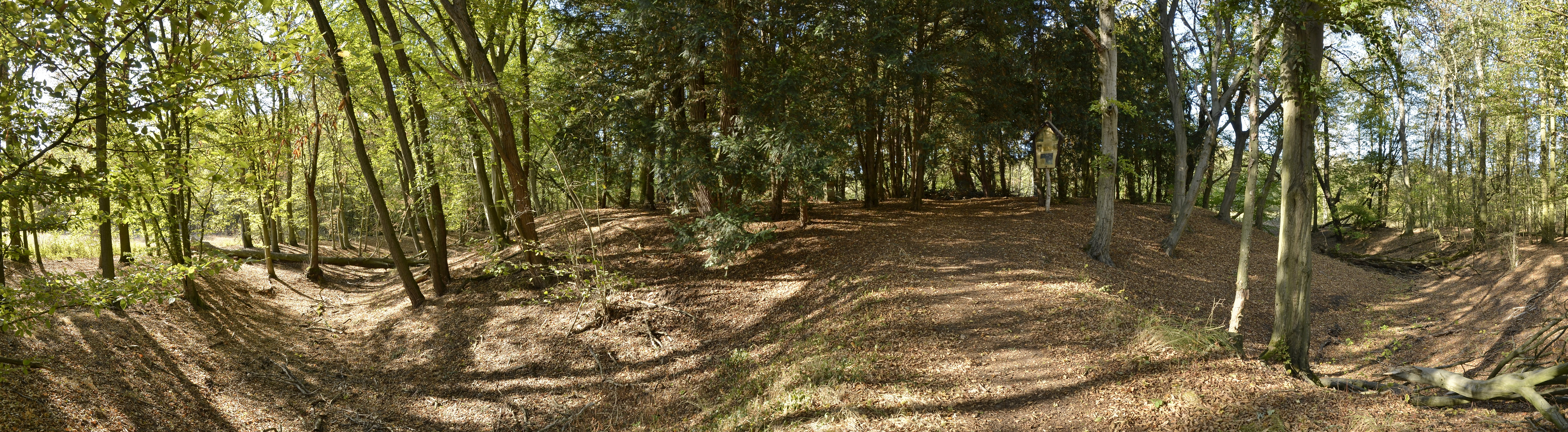 Gelände des Försterfriedhofes in Lödderitz, auf einer ehemaligen slawischen Burg